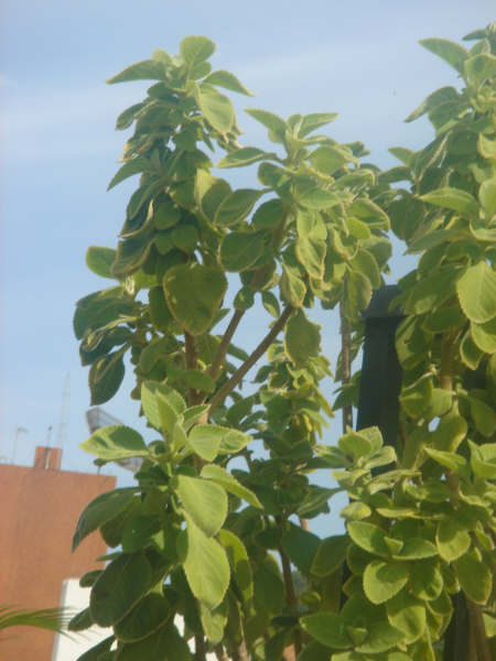 Boldo